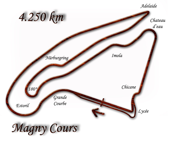 France Grand Prix Formula 1 /1992-1999/ Autor: Jiří Žemlička